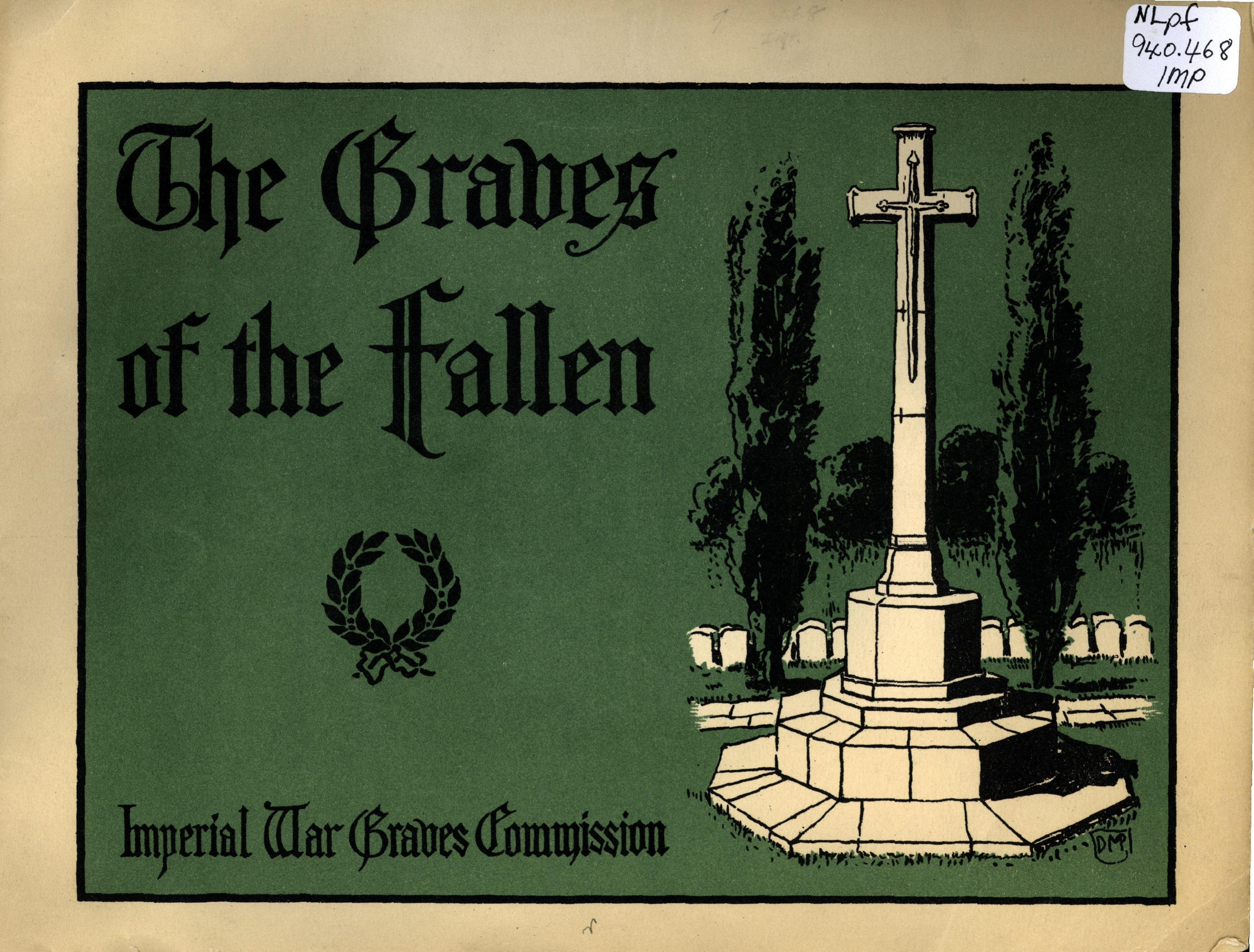 cover page. 16 p. : ill. ; 22 x 23 cm.